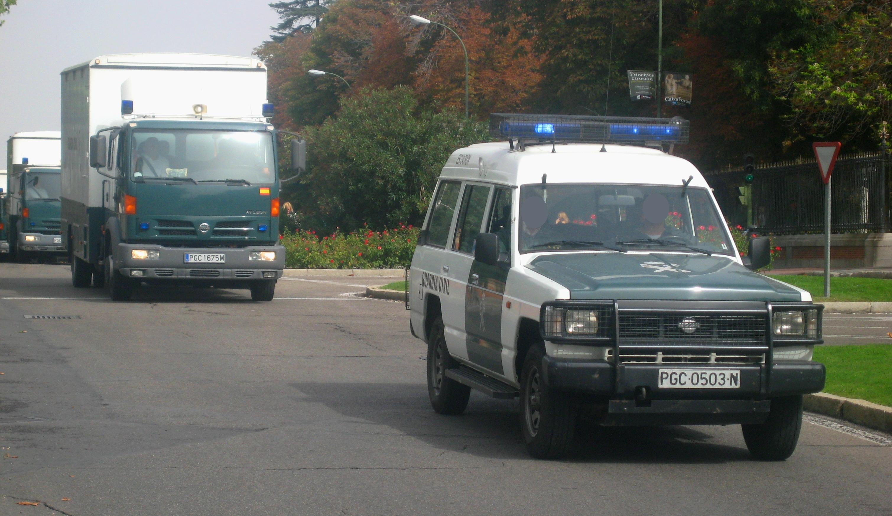 Nissan Patrol largo y Nissan Atleons del Escuadrón de la Guardia Civil.